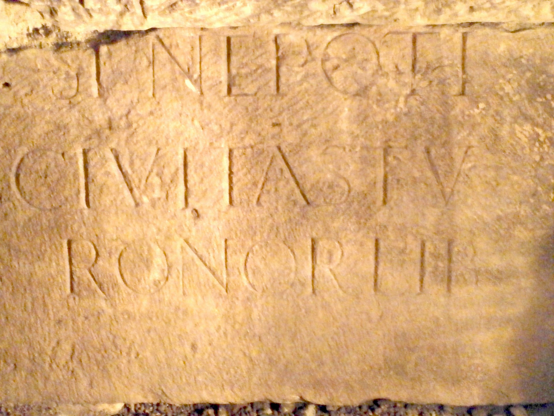 bloc gravé de remploi en foundationInscription restituée : (...)SI NEPOTI CIVITAS TVRONOR(VM) LIB(ERA)(... La cité libre des Turons)